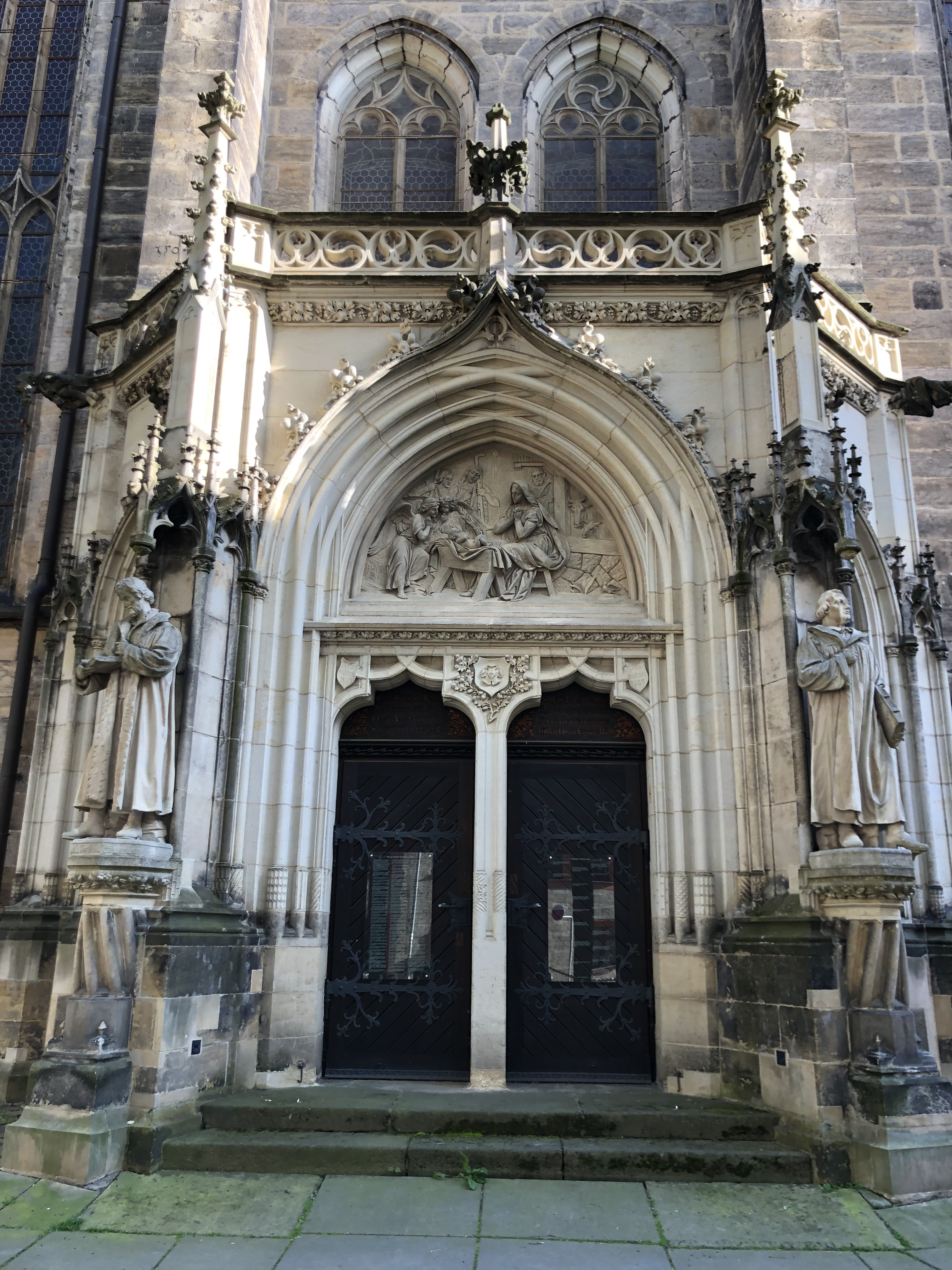 Kostel panny Marie v Pirně